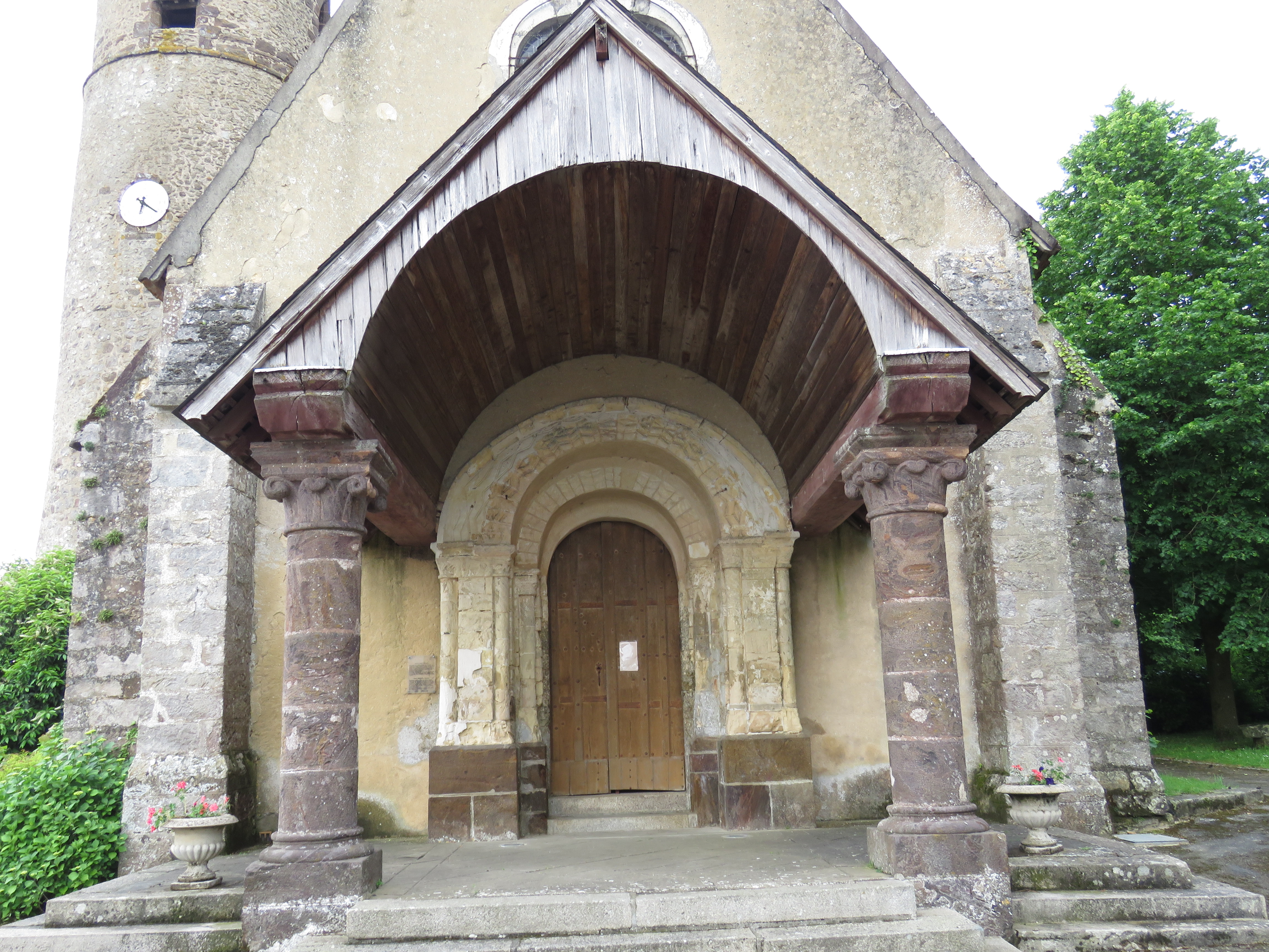 église